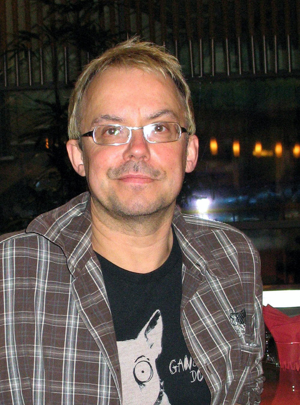 Henni Nachtsheim bei der Pressevorstellung von Lissi und der wilde Kaiser, Berlin, 2.10.2007